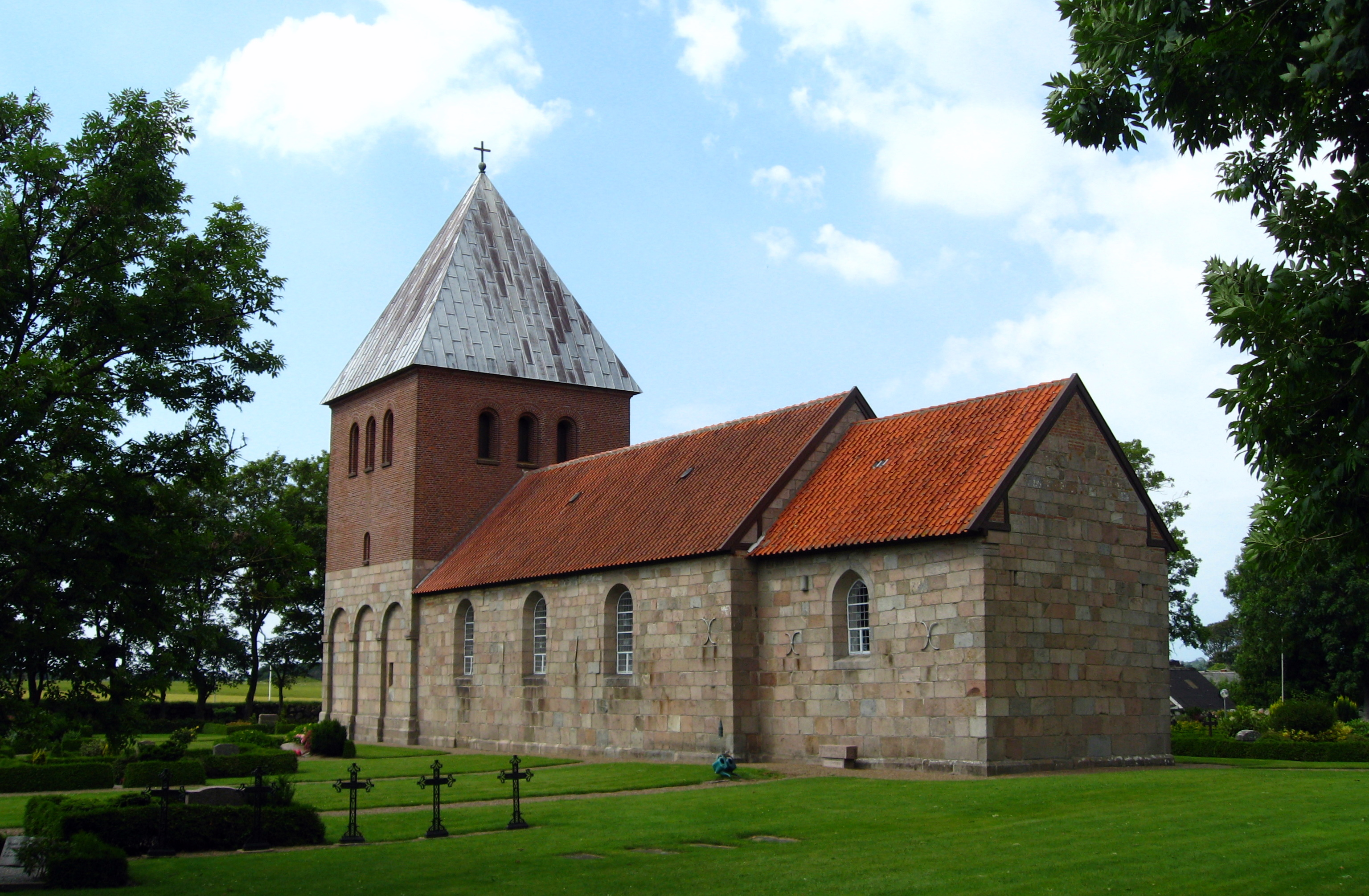 Bejstrup Kirke